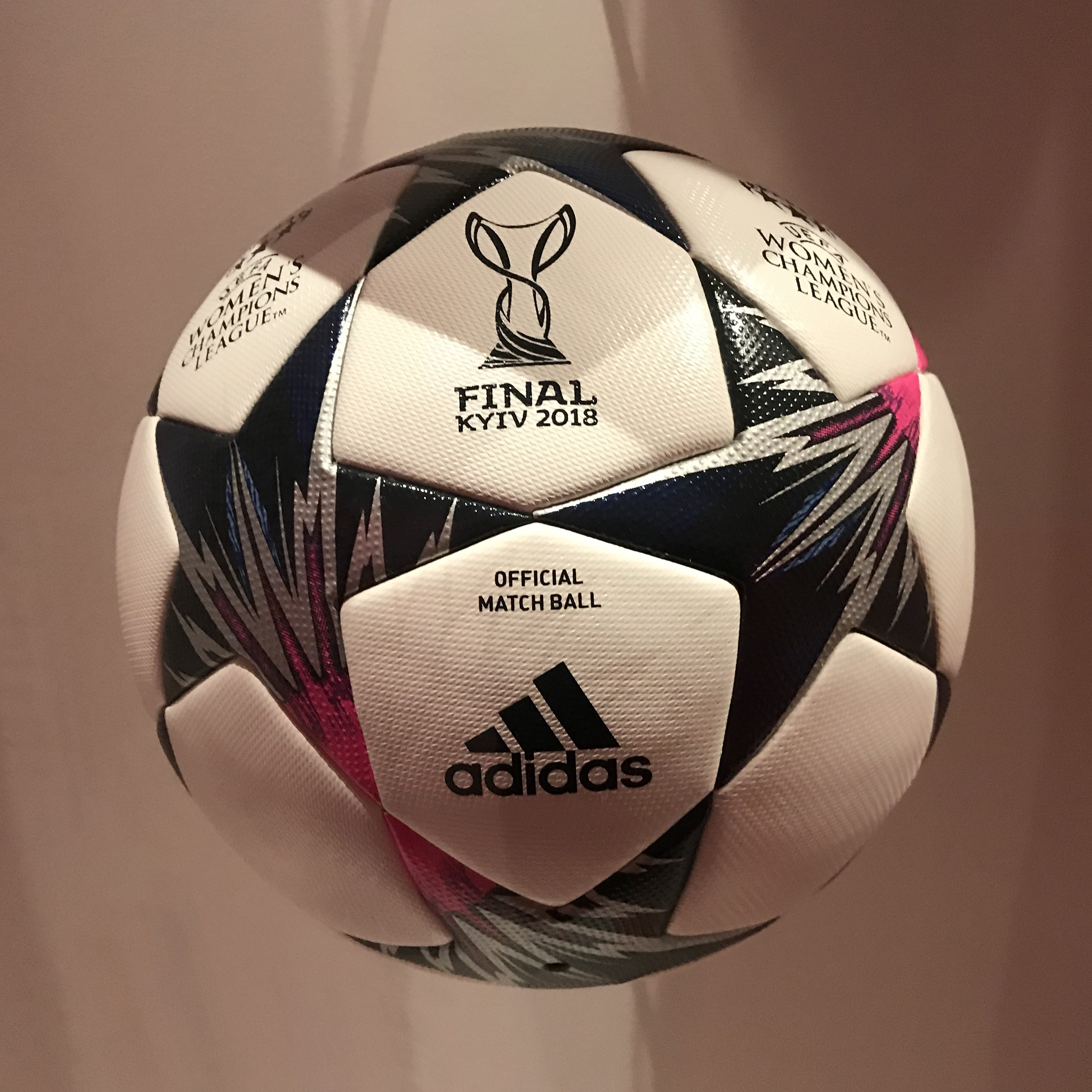 OL Le Musée au Parc OL.